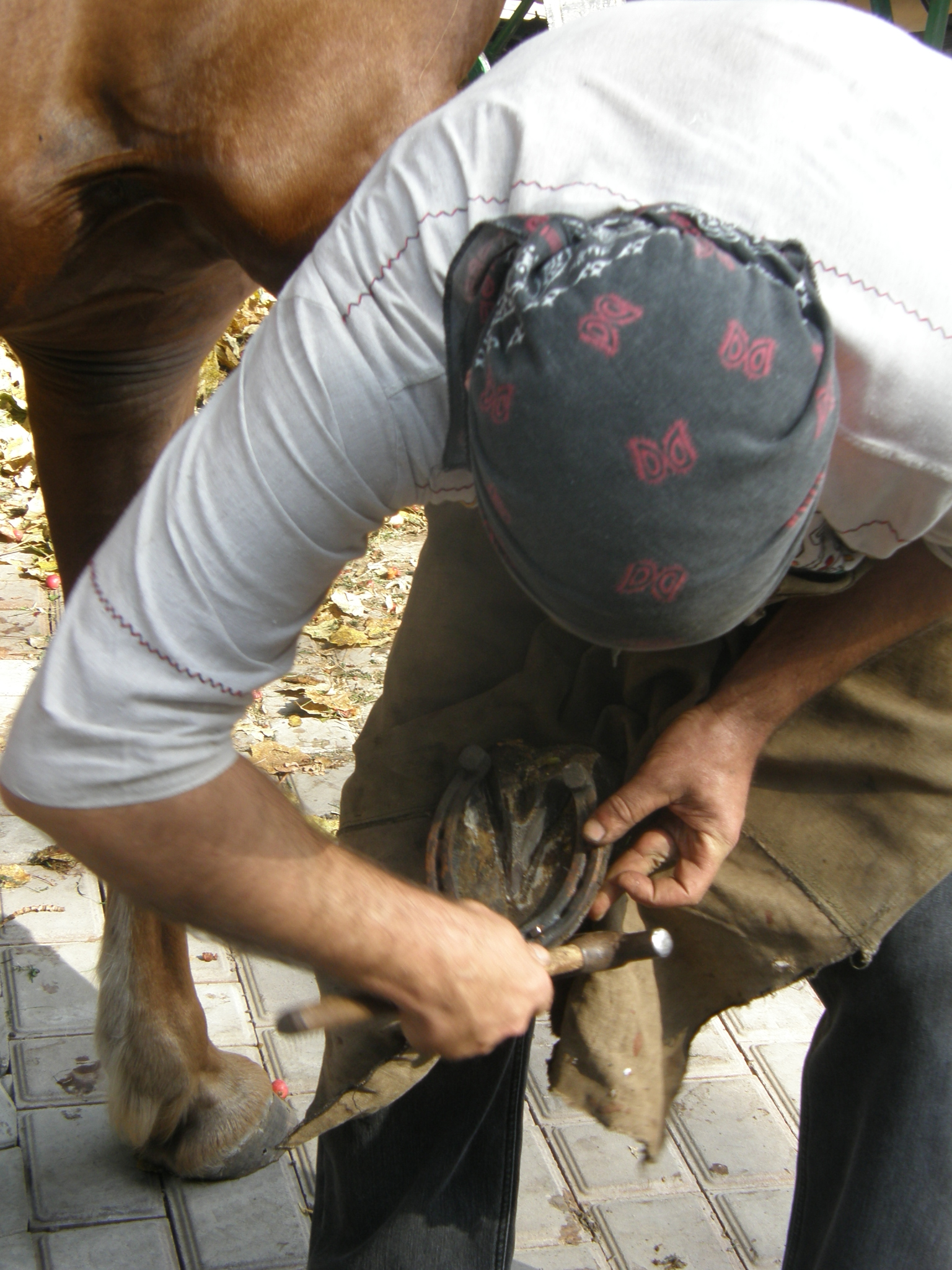 Подковывание лошади на 12 международный кузнечном фестивале в Донецке